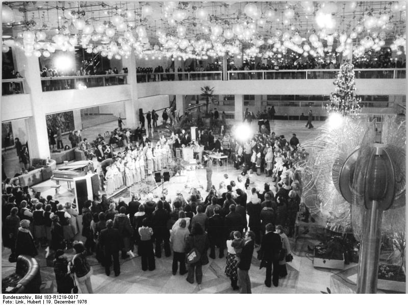 ADN-ZB Link 19.12.76 Berlin: Konzert für Corvalan im Palast der Republik- "Berliner Künstler grüßen Luis Corvalan" - unter diesem Motto stand am 19.12.76 ein Solidaritätskonzert im Hauptfoyer des Palastes der Republik. Zu den zahlreichen mitwirkenden Berufs- und Laienkünstlern gehörte auch der Pionierchor "Omnibus"."